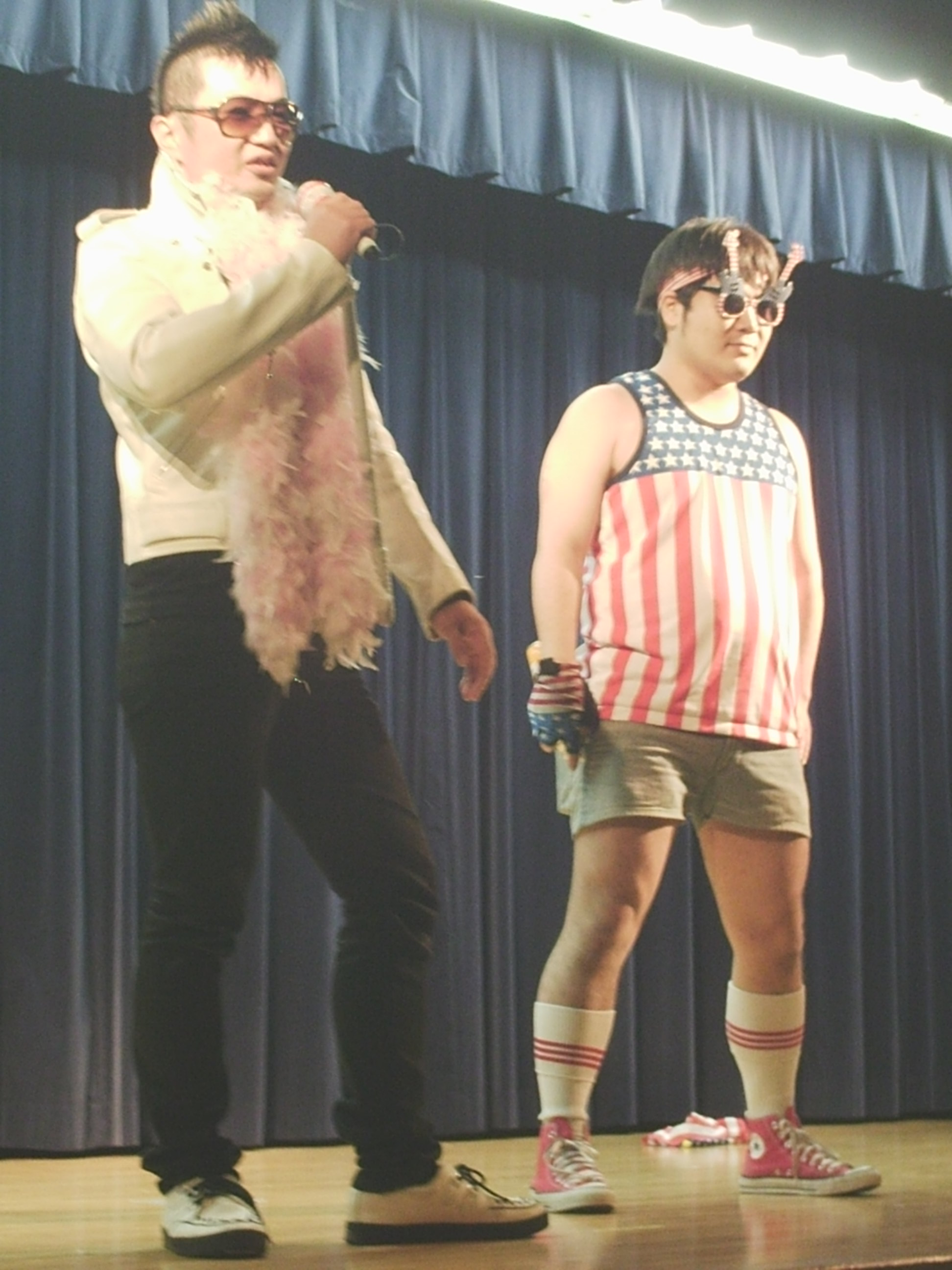 ロックンロールコメディーショー (2009年5月)